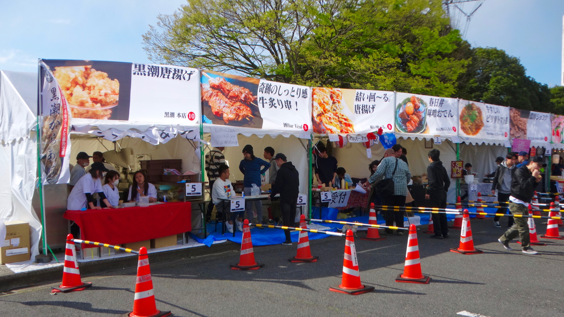 落合公園で2016年から開催されてる「春日井グルメ王座決定戦」（2018年4月撮影）。